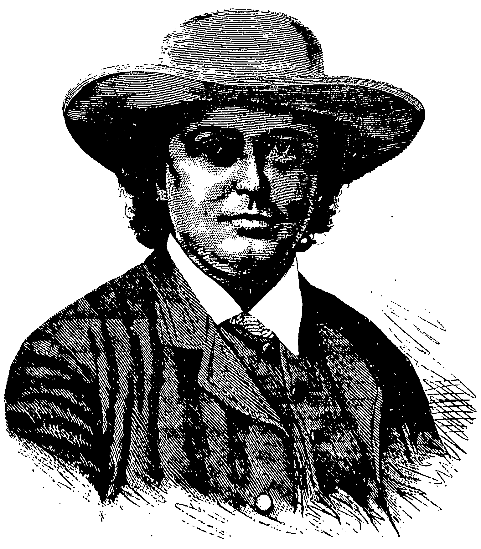 Den norske redaktøren Erik Vullum.